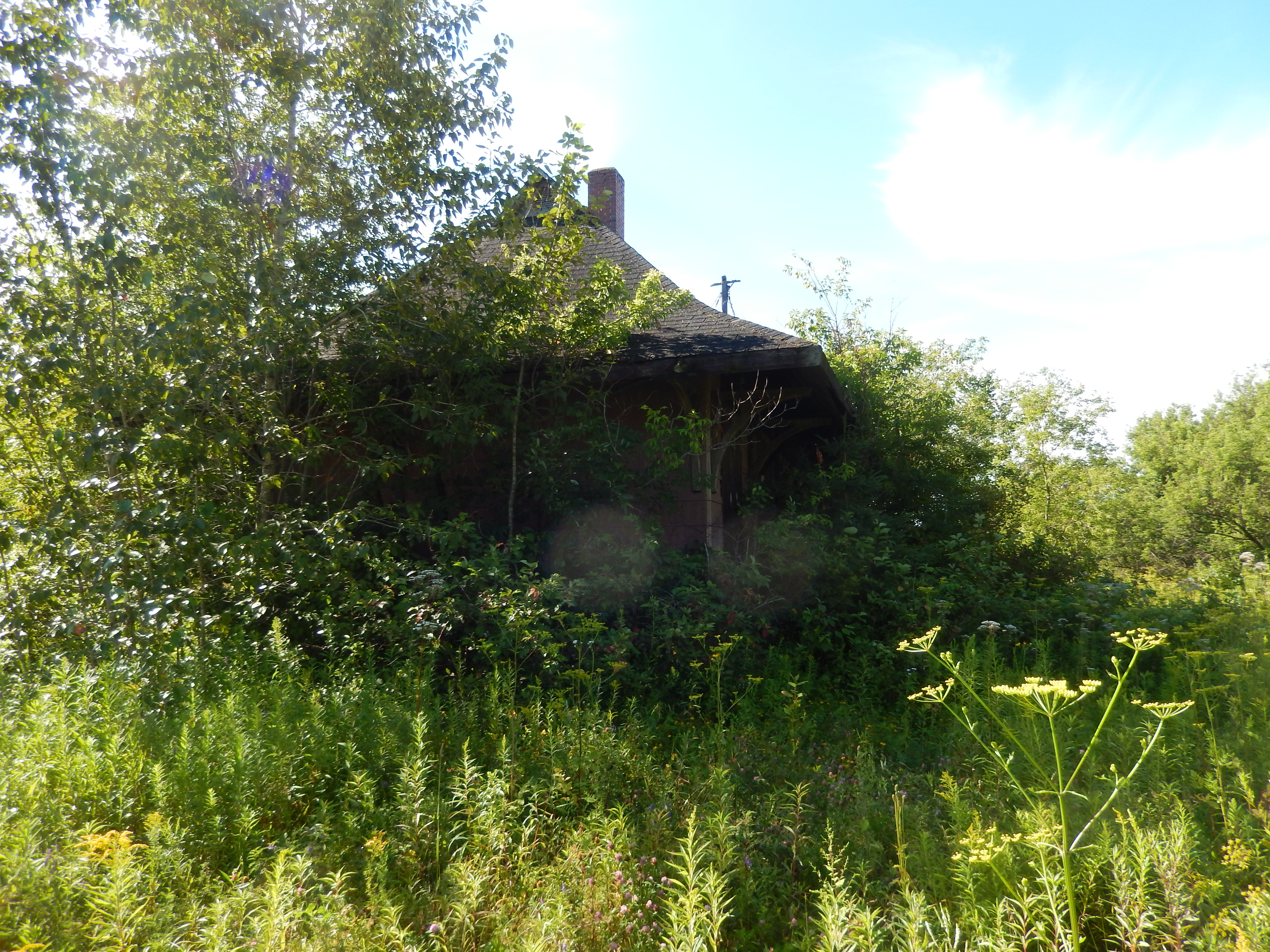 Gare ferroviaire du Canadien Pacifique, Rue Station, Aroostook (Canada). (Protection GFP. Voir la liste des lieux patrimoniaux du comté de Victoria (Nouveau-Brunswick) pour plus de détails).